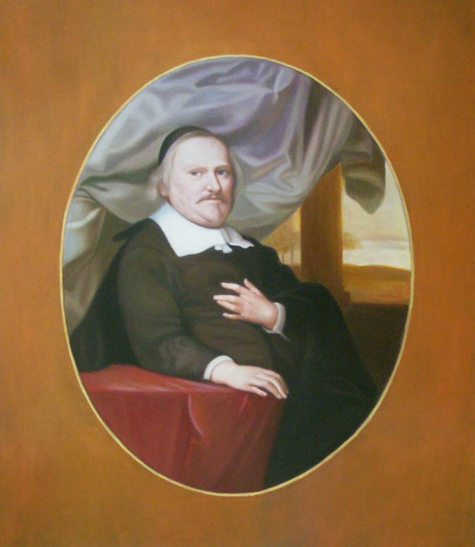 Wassenaar, Private collection